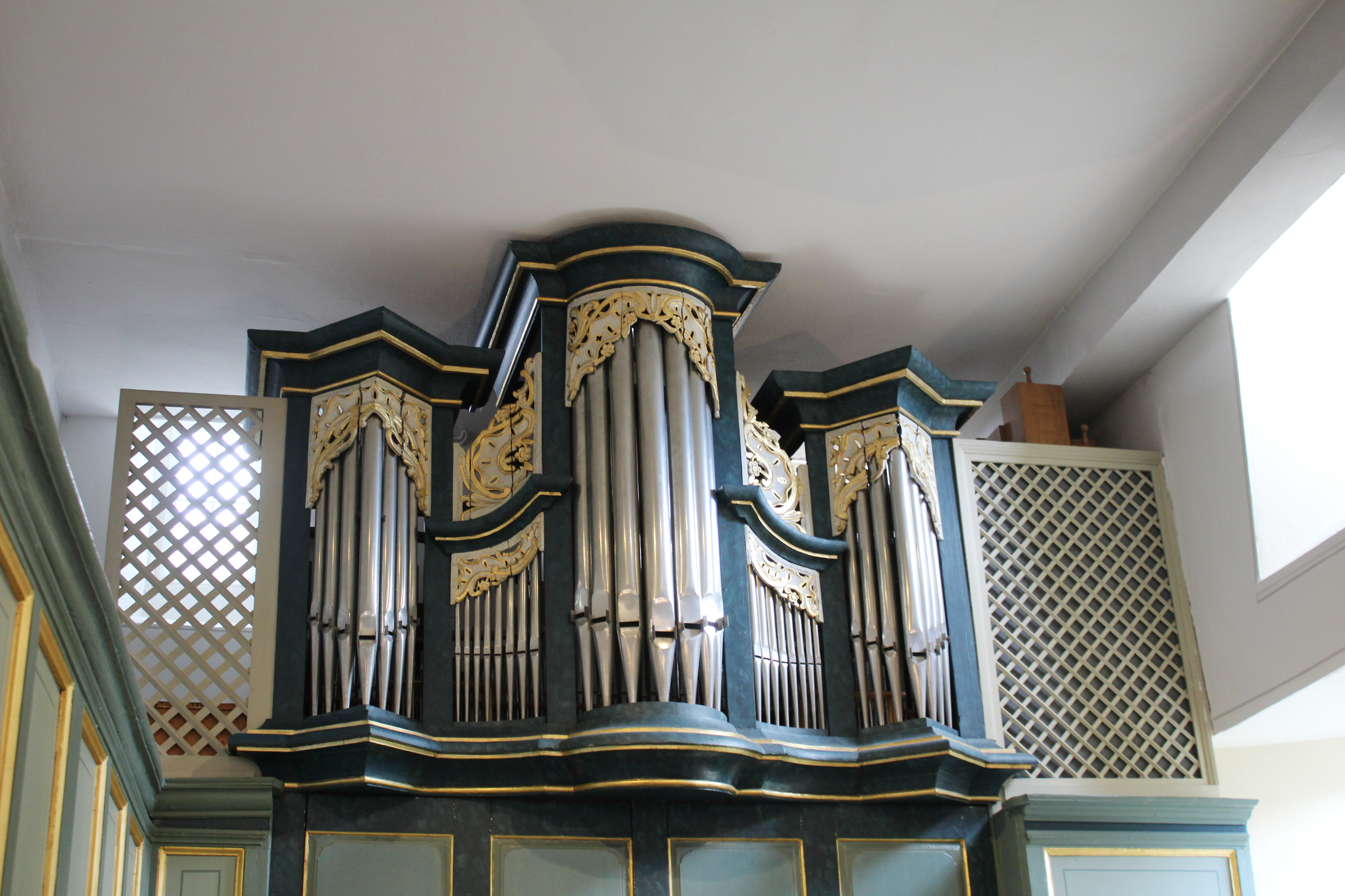 Ev. Kirche Laufdorf, Lahn-Dill-Kreis, Hessen, Deutschland